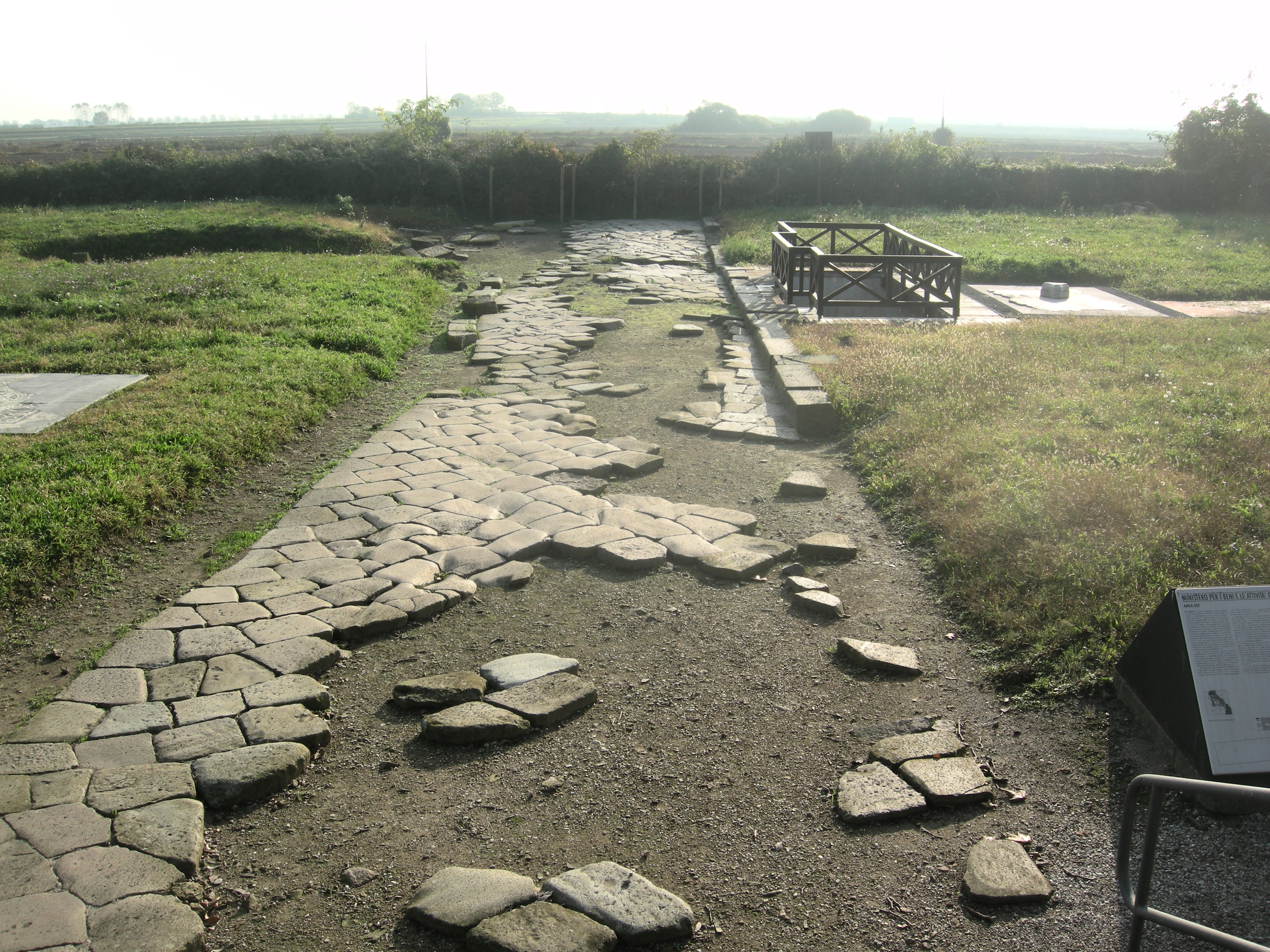 Cervellin, opera propria, zona archeologica Altino (VE) italy, lic. GFDL, data 27.10.2009